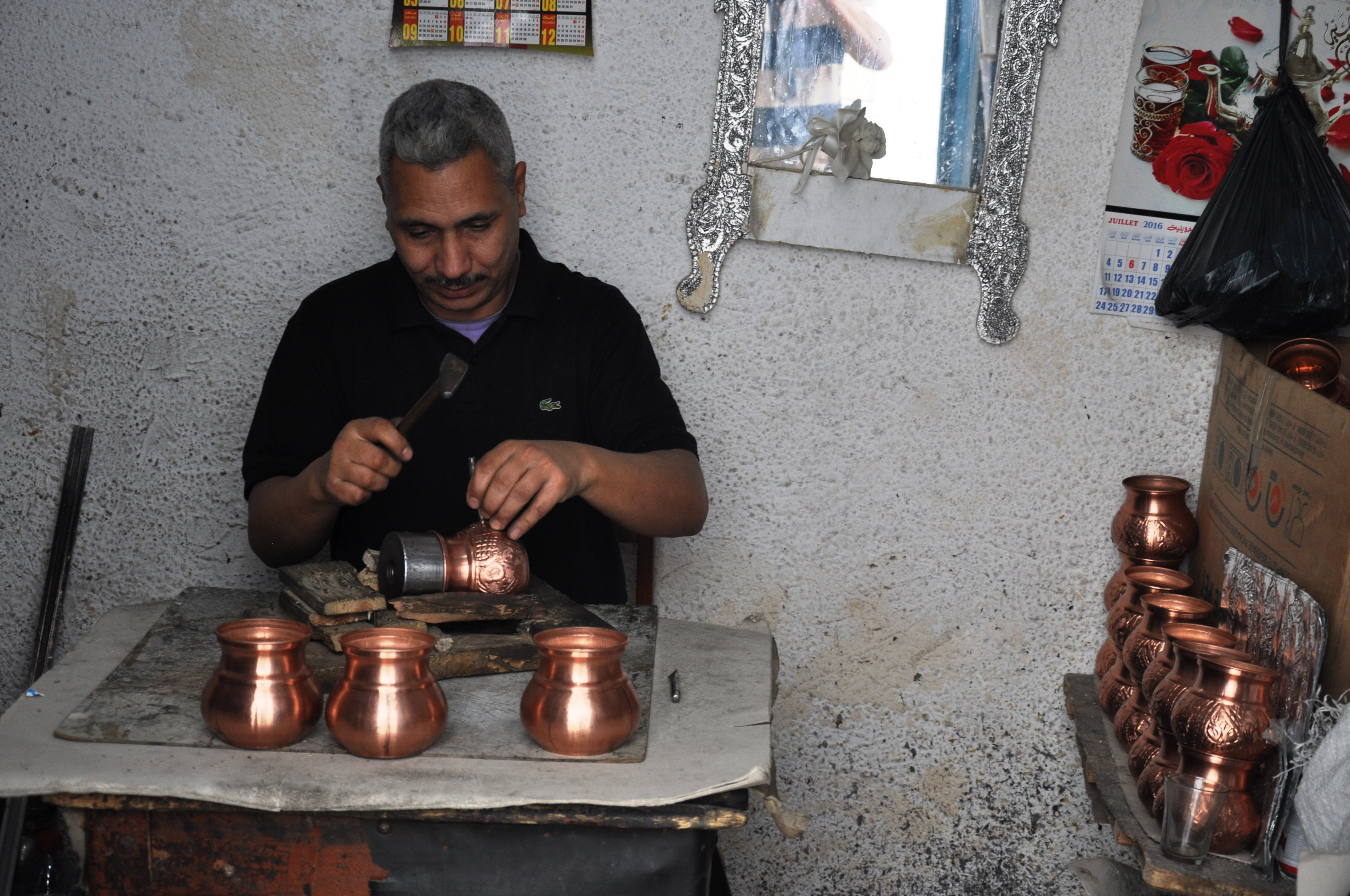 confection des tasses en cuivre This is an image of "African people at work" from Tunisia